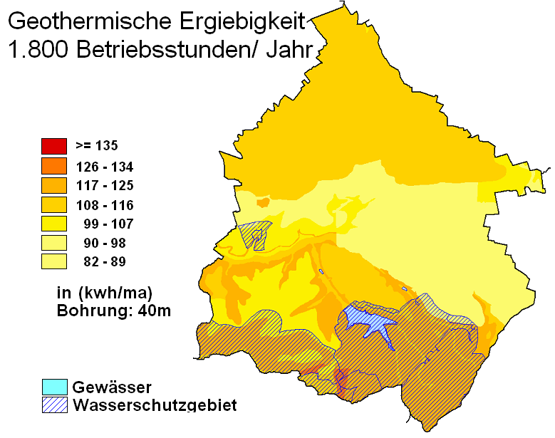 geothermische Karte Bad Wünnenberg